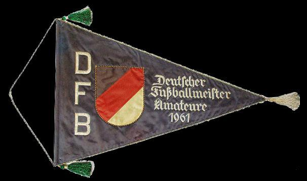 Wimpel Deutscher Amateurmeister von 1961